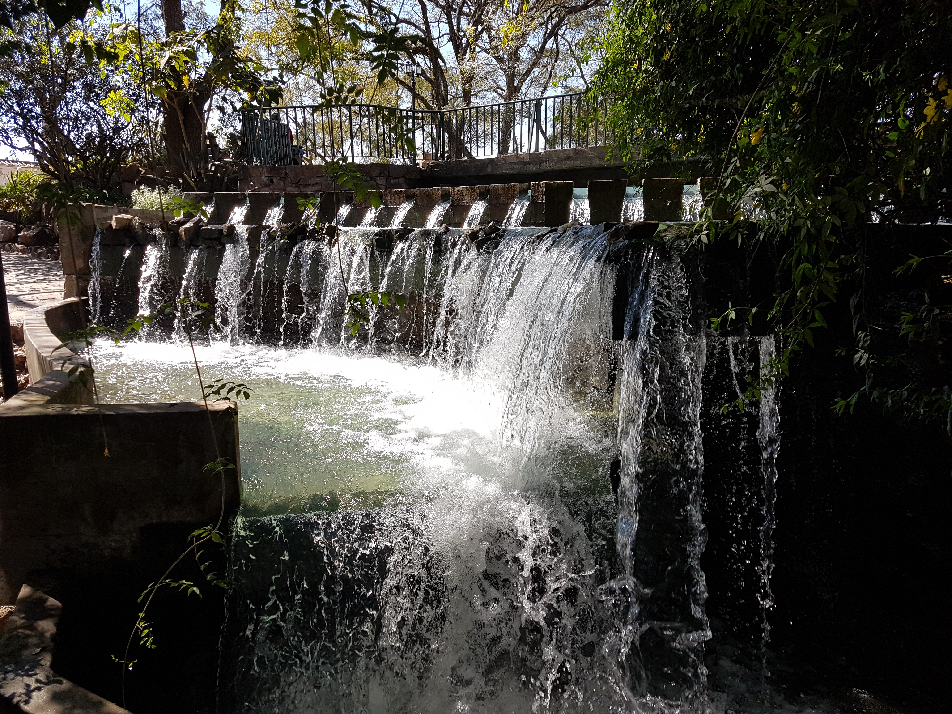 cultural. lugares